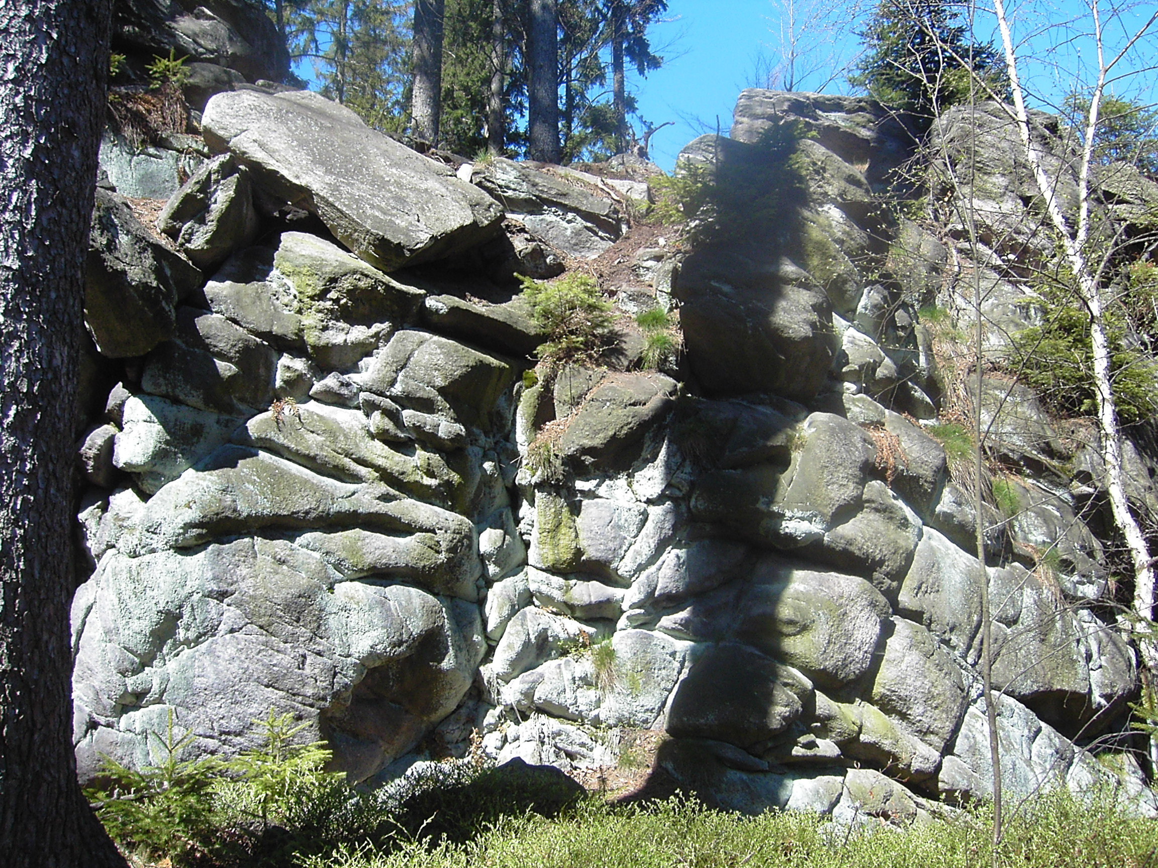 Milovské perníčky